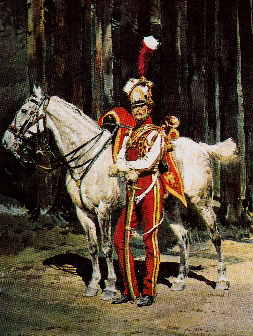 Trompette des lanciers rouges de la Garde impériale en grande tenue.